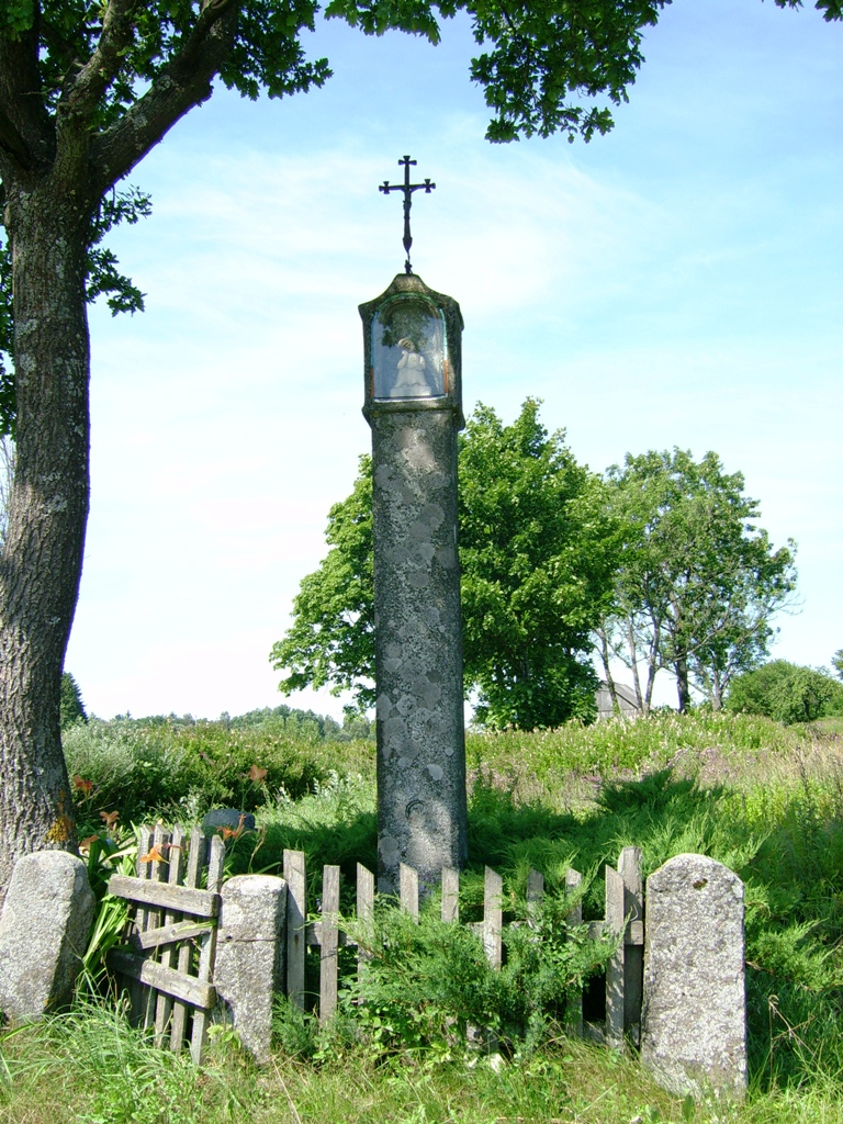 Reistrų akmeninis kryžius